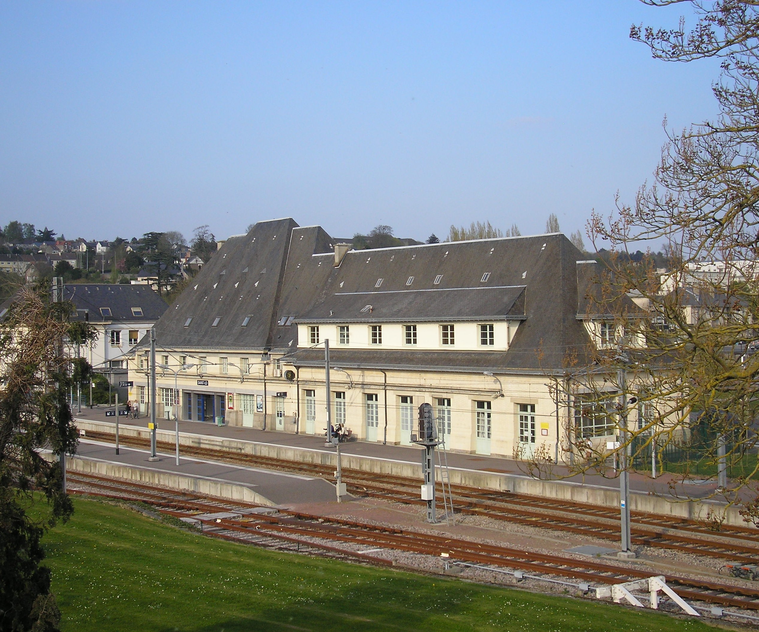 Saint-Lô (Normandie, France). La gare.